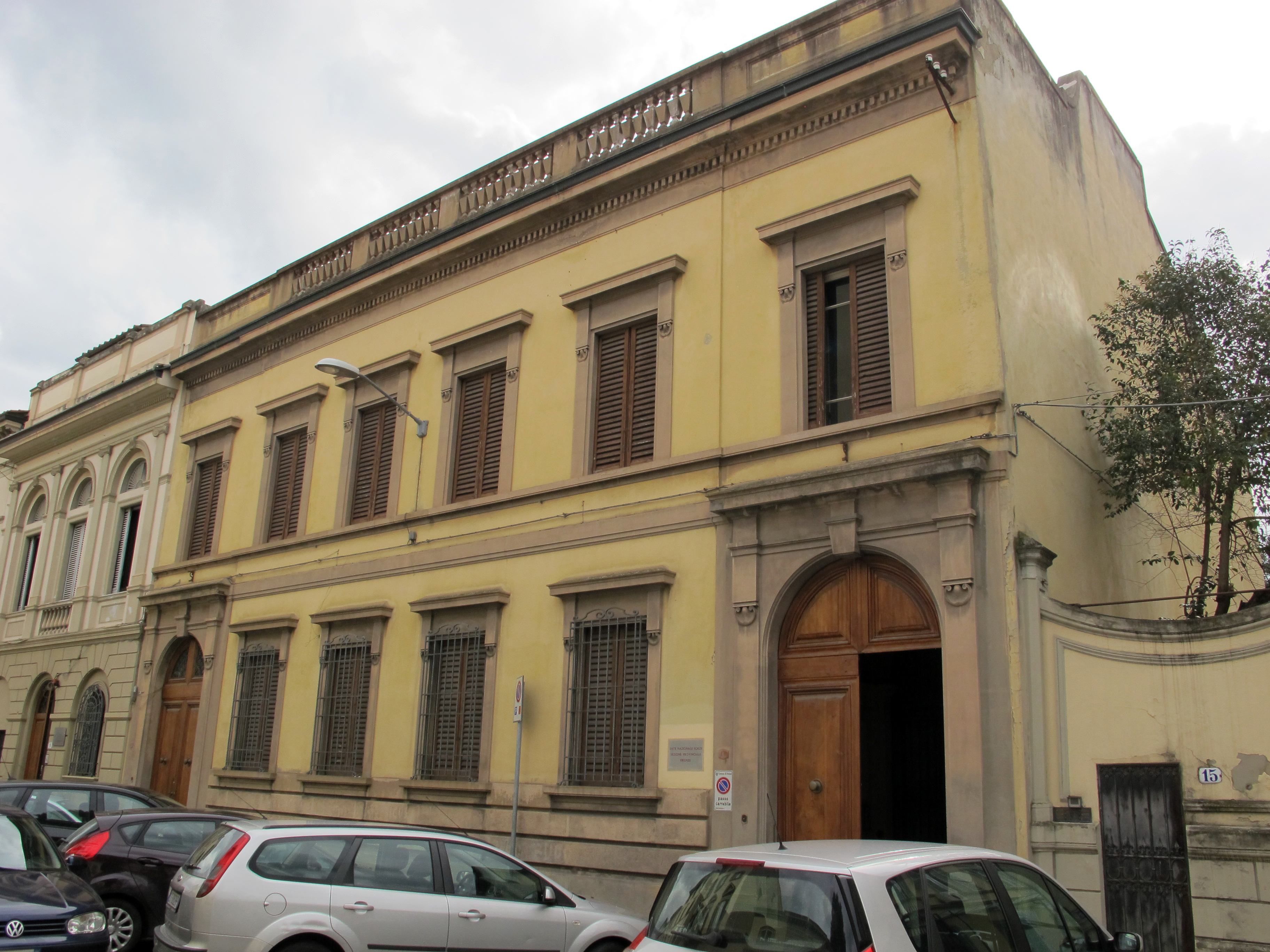 Via manzoni 13, ente nazionale sordi, sede di fi